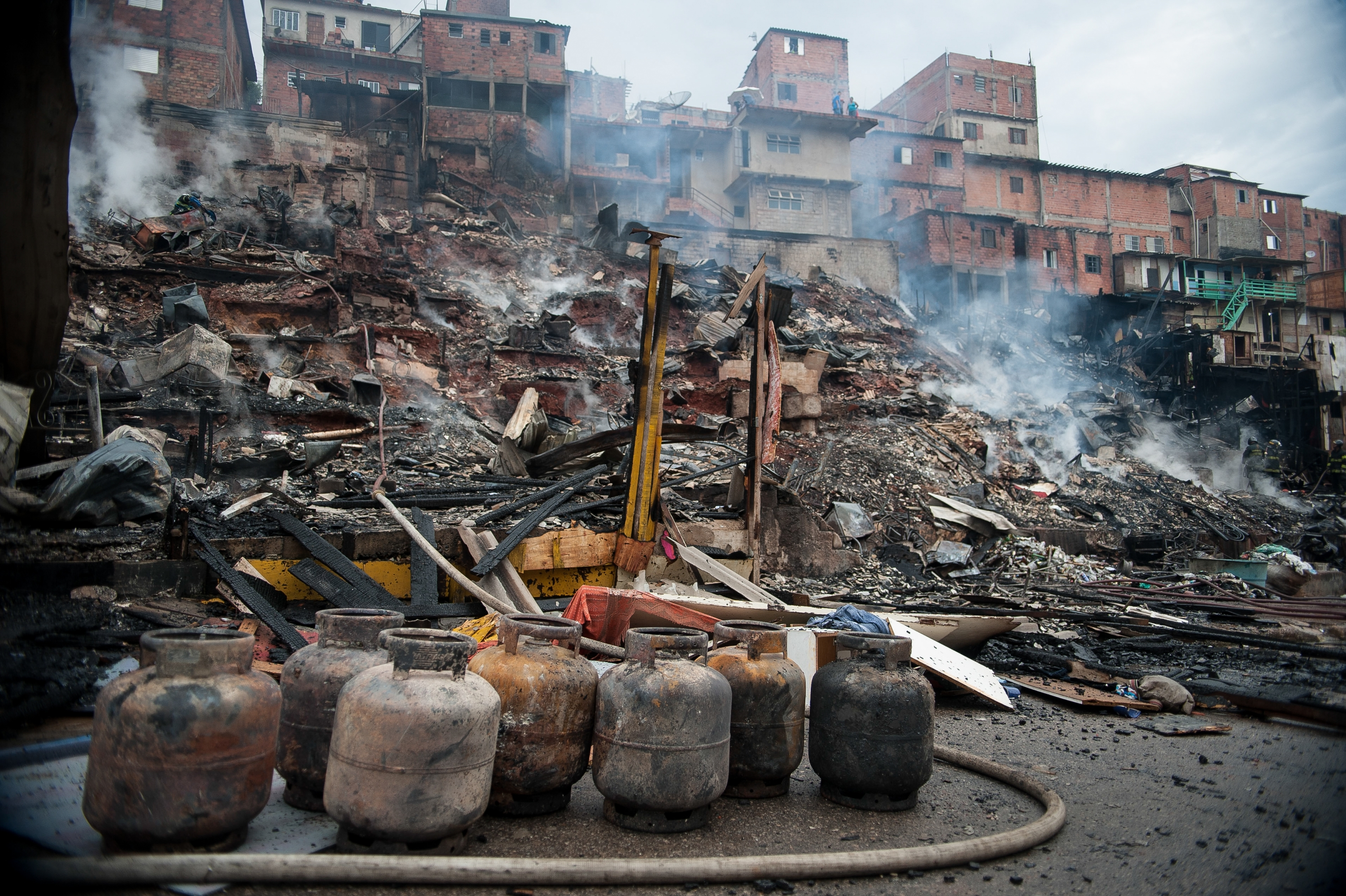 Incêndio atinge casas da comunidade de Paraisópolis, na zona sul da cidade de São Paulo.